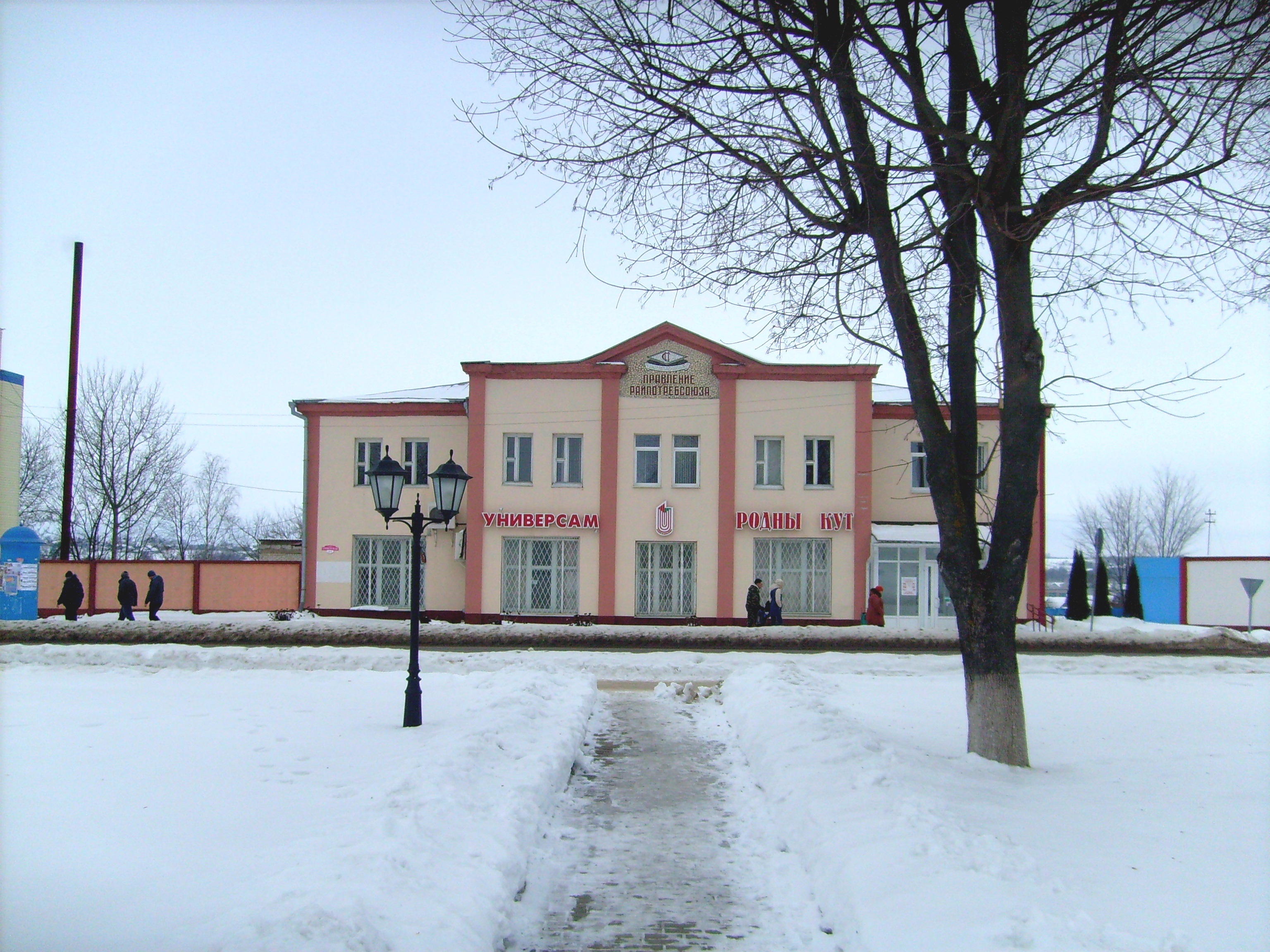 Универсам в Круглом